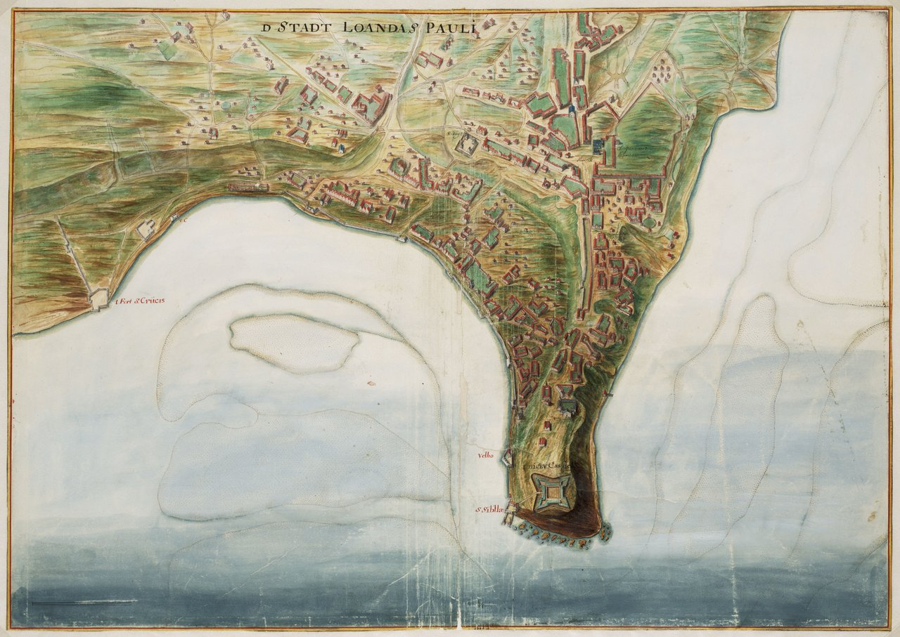 "D Stadt Loandas Pauli" Plattegrond van Loanda St. Paolo/Luanda, Angola